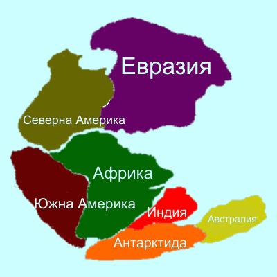 Пангея.